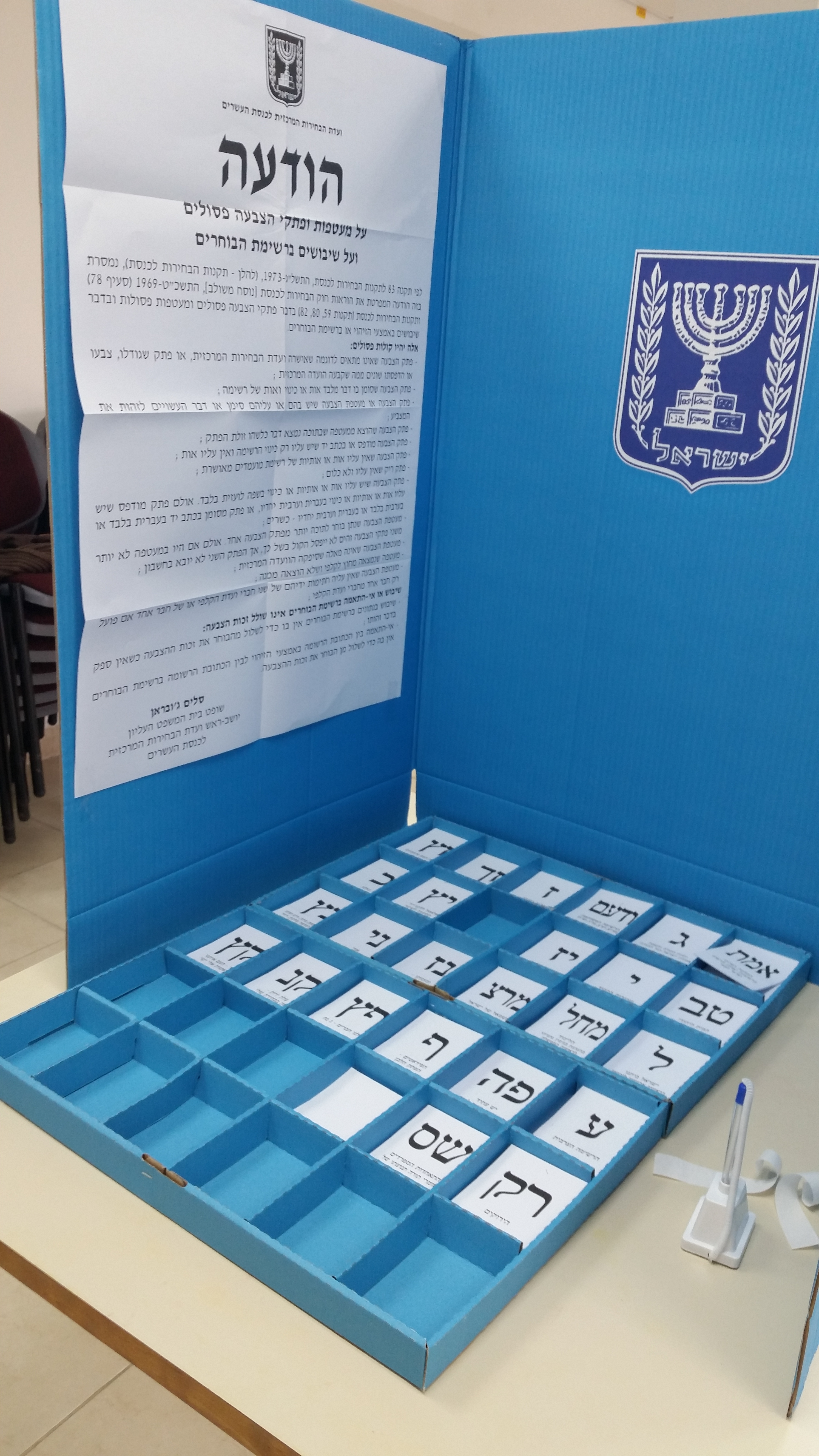 קלפי בחירות 2015 בקלפי מס 1 בגבעת נשר